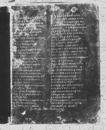 Codex Sangermanensis; Uncial 0319 (Gregory-Aland); RNB Gr. 20